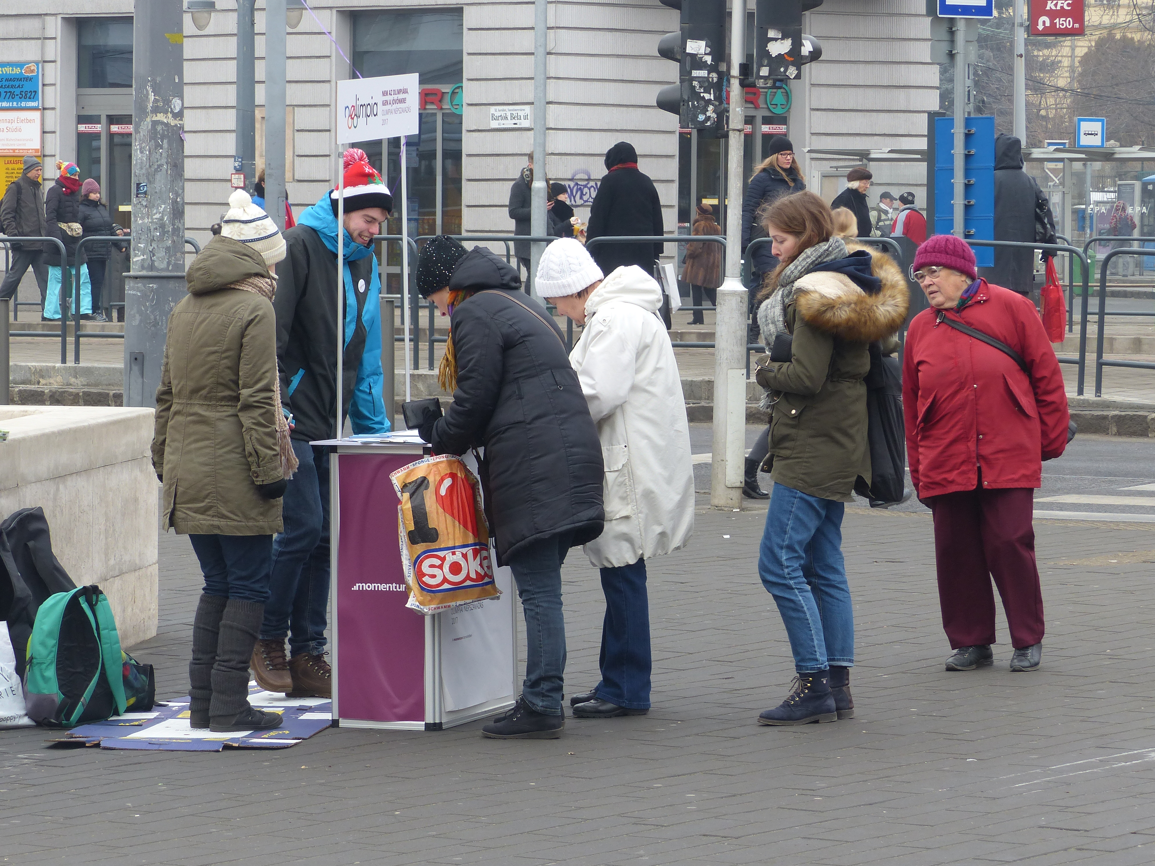 A felvétel 2017. január 25-én, szerdán délelőtt készült a Móricz Zsigmond körtéren, Budapesten. Olimpia ellenes aláírásgyűjtés. A népszavazás kezdeményezés a 2024-es budapesti olimpiai pályázat visszavonását kívánja elérni. Amennyiben sikerül összegyűjteni a szükséges aláírást, Budapesten népszavazás lesz a Fővárosi Választási Iroda által hitelesített kérdésben, amely így hangzik: „Egyetért-e Ön azzal, hogy Budapest Főváros Önkormányzata vonja vissza a 2024. évi nyári olimpiai és paralimpiai játékok megrendezésére irányuló pályázatát?” Források: [1] [2] [3] Momentum Mozgalom: [4]